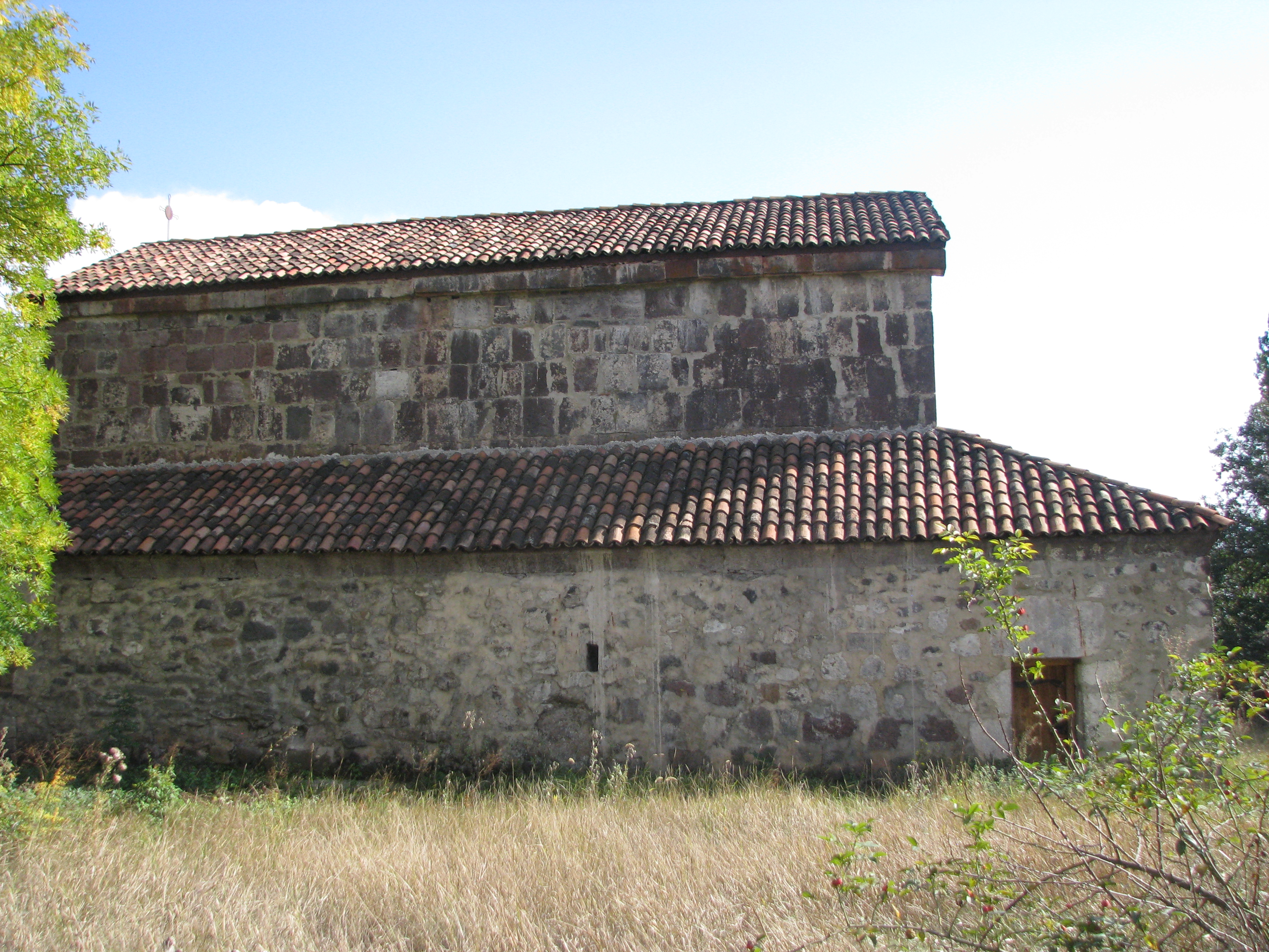 წმ. გიორგის ტაძარი